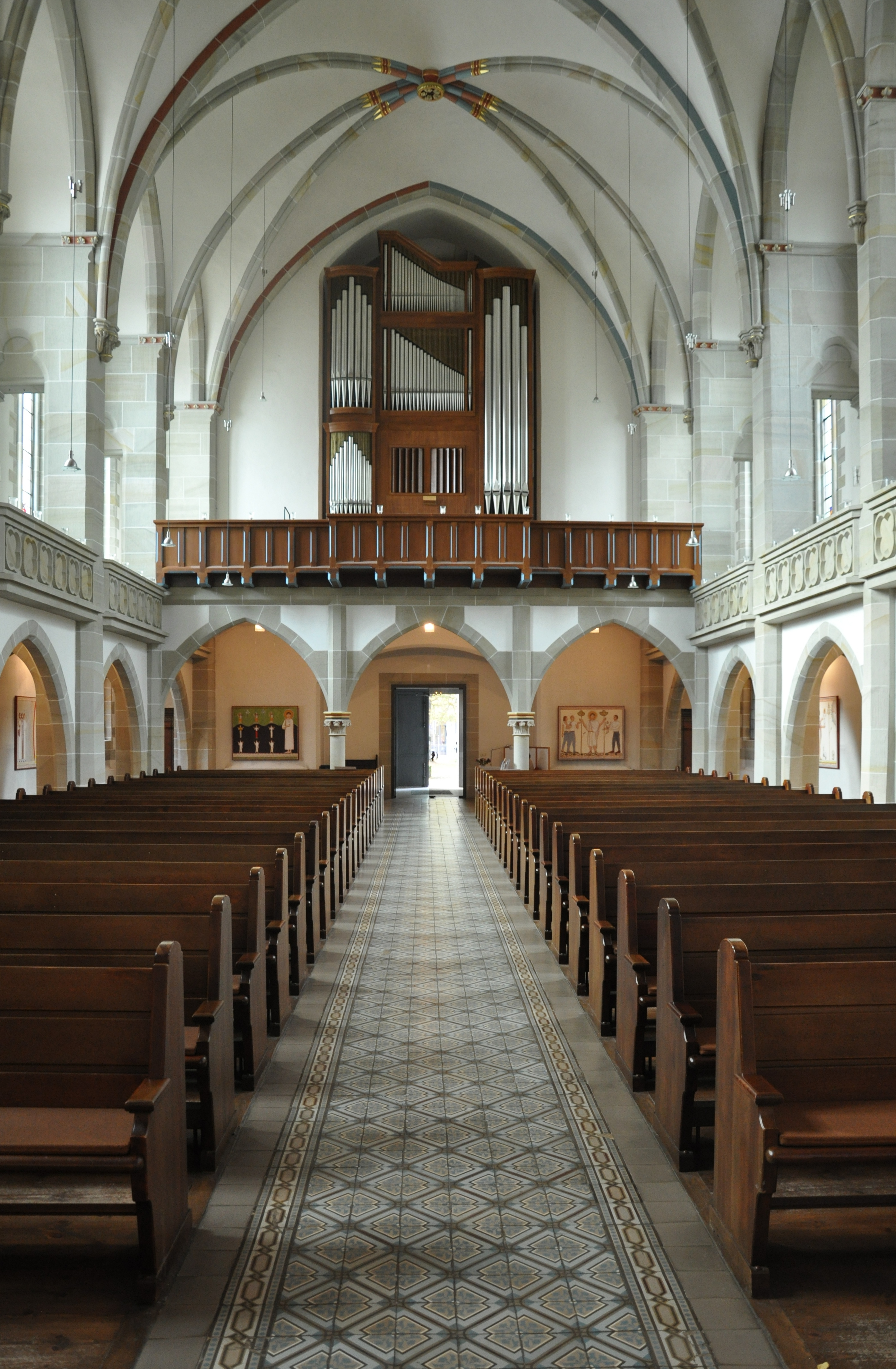 Hannover, Gartenkirche, Blick zur Hauptorgel